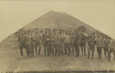 Български войници от Девети пехотен пловдивски полк при с. Дедели, край Дойран, Македония. Офицер Гурко Мархолев е петият от ляво надясно, със сабя.